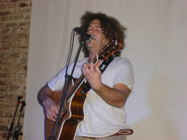 Palo Pandolfo en vivo (La gaviota bar 8-7-2010 Olavarria)